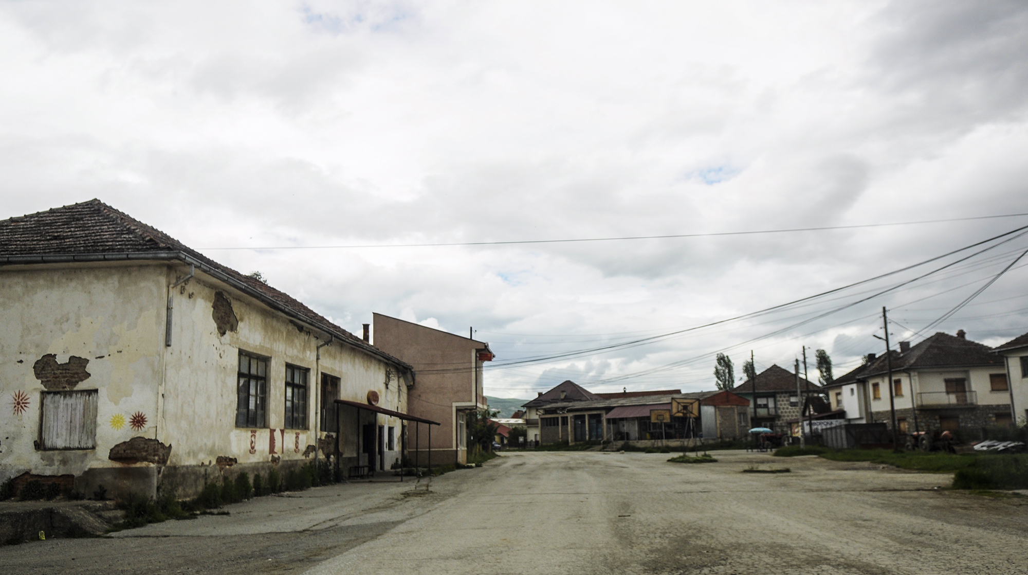 Ложани стариот дом на културата и куќите средсело